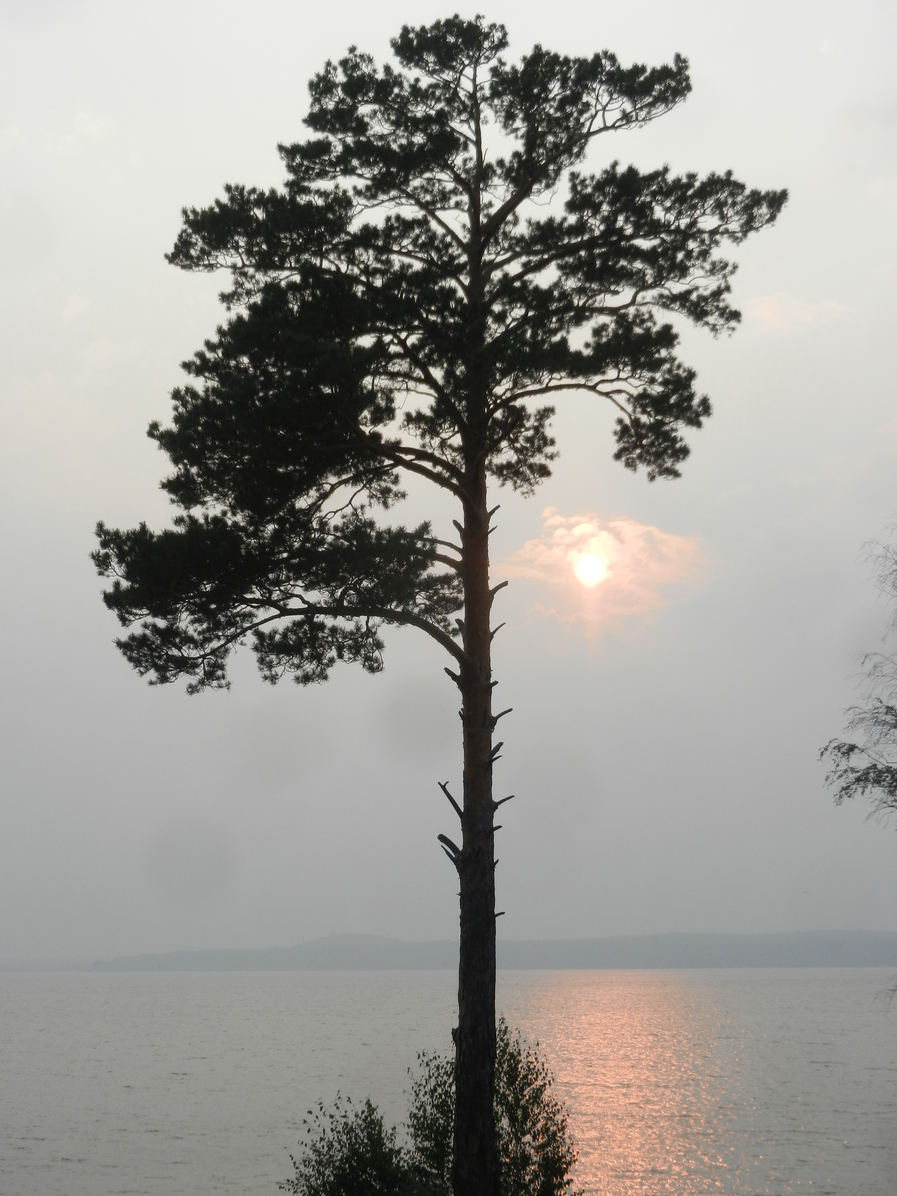 озеро Окункуль